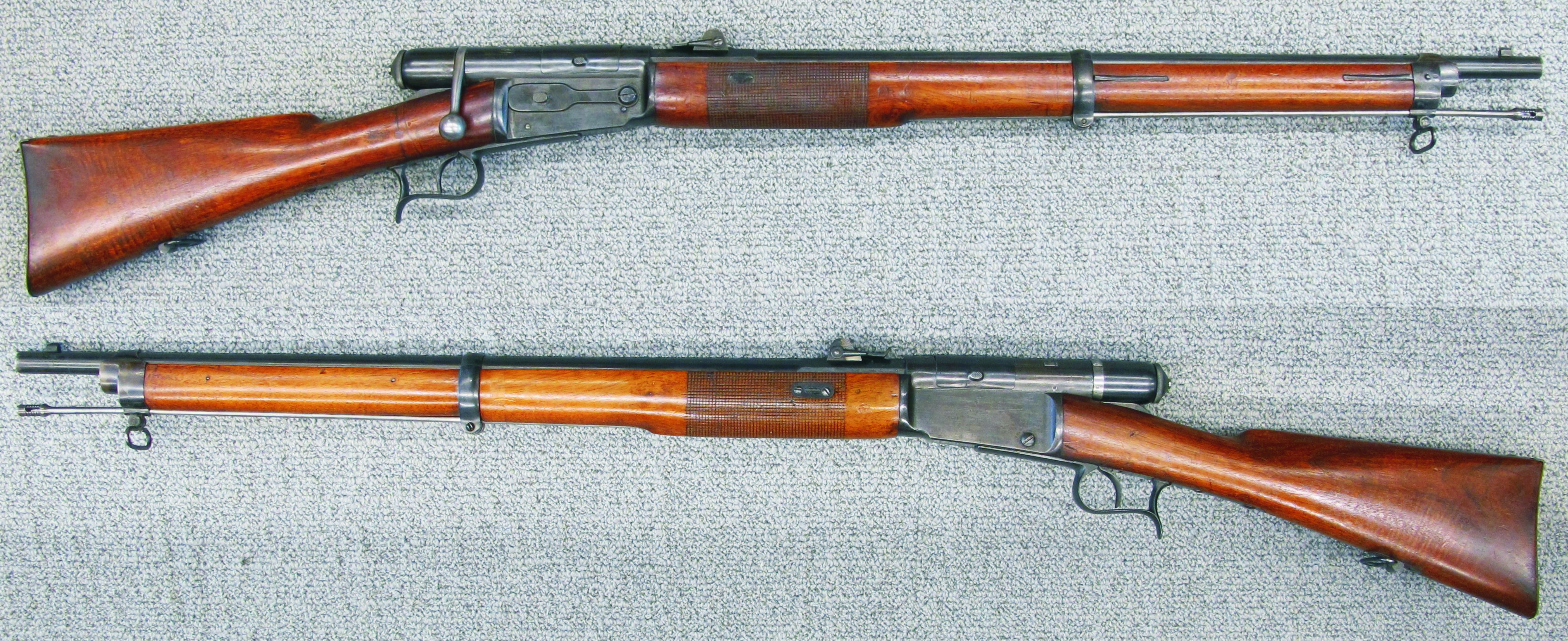 Fusil Vetterli modèle 1870 destiné aux gendarmeries cantonales et aux corps de police municipales.